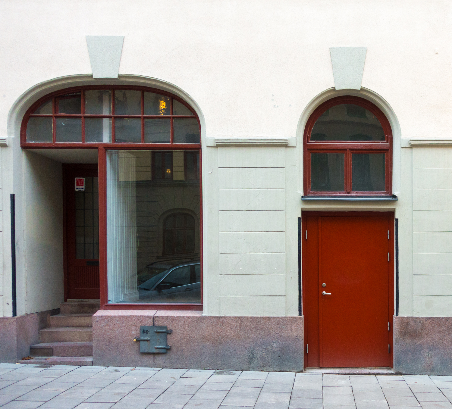 Sigtunagatan 14 den 14 november 2018.